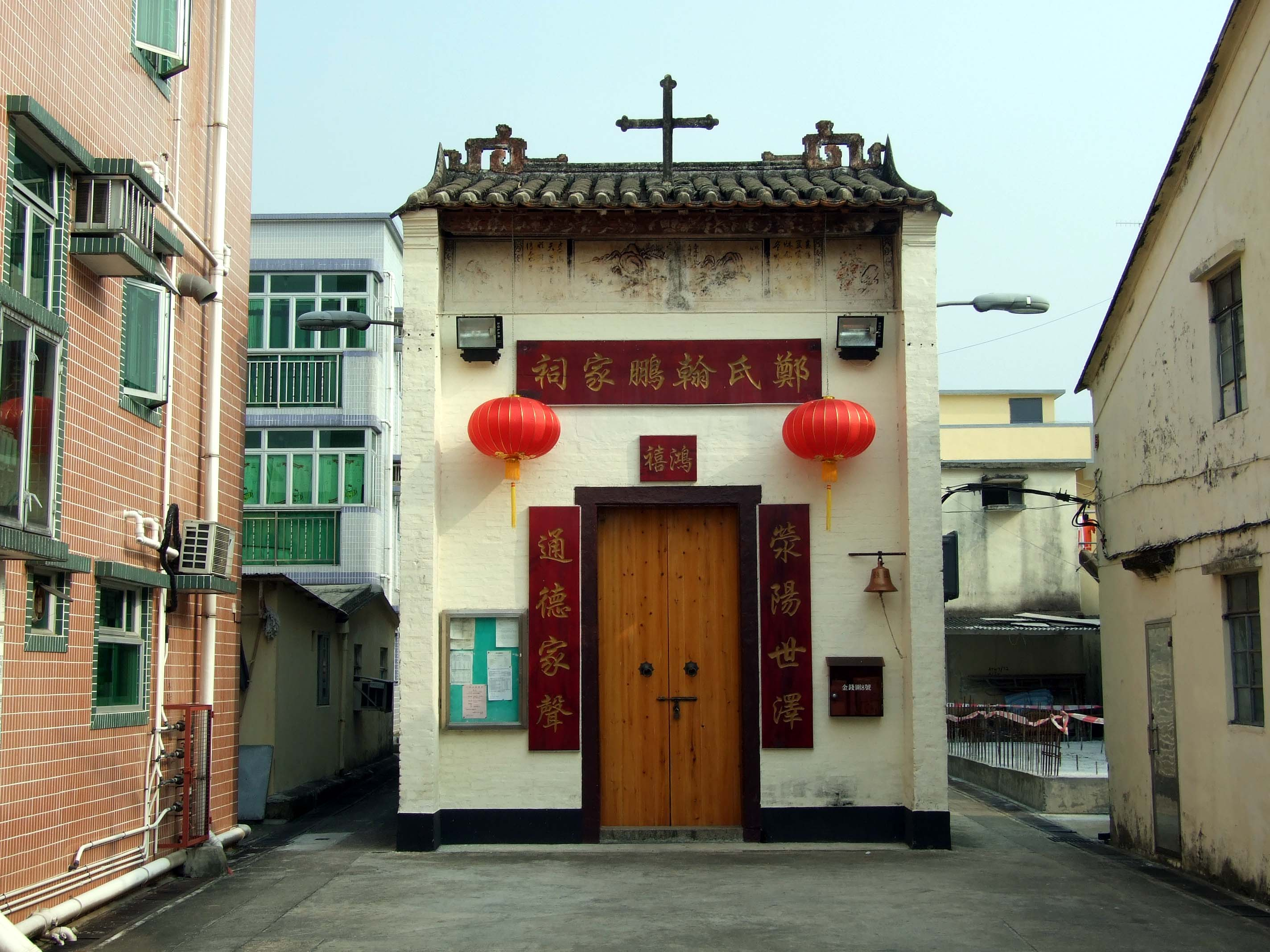 中文（香港）: 元朗八鄉金錢圍翰鵬鄭家祠